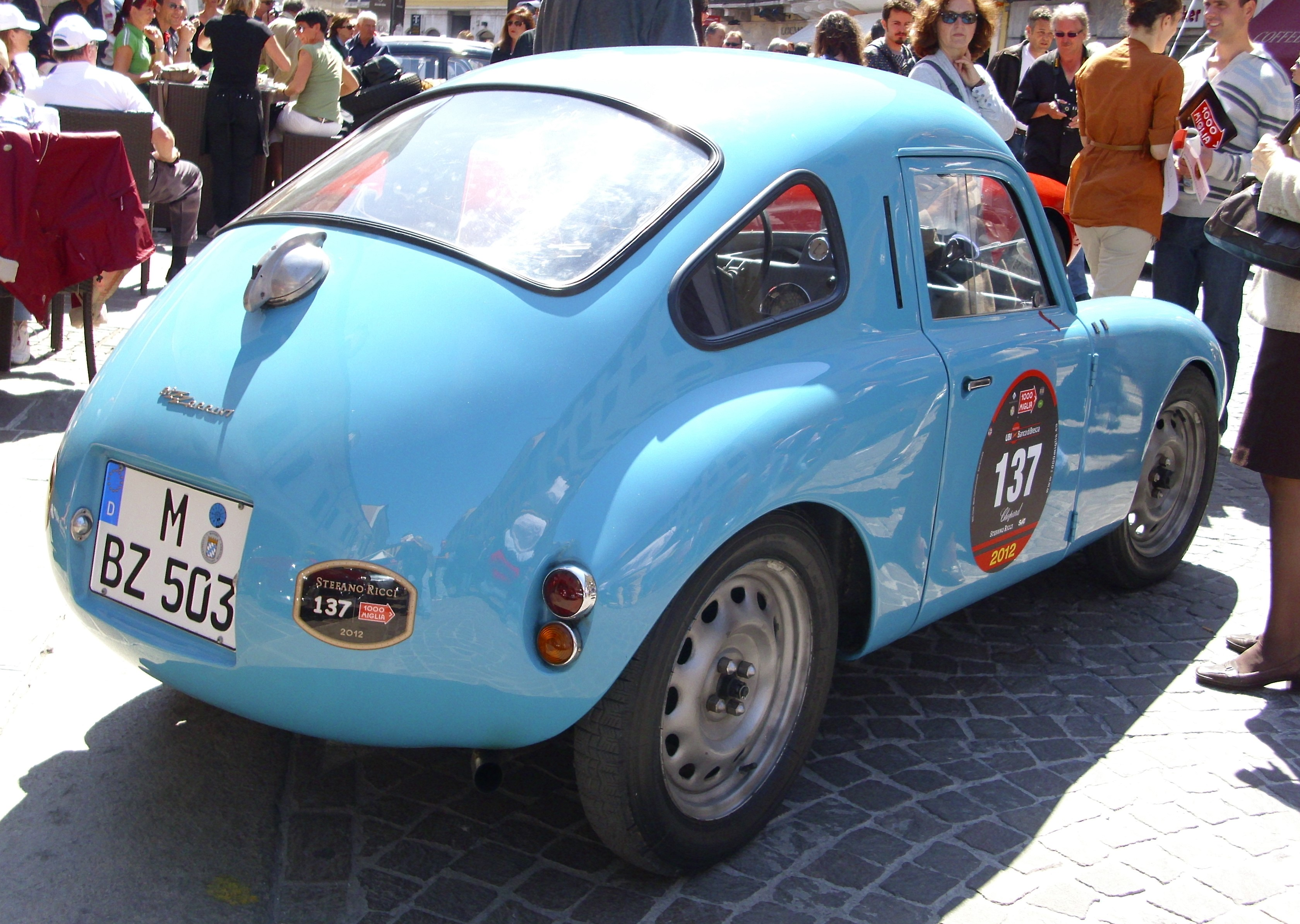 Bizzarrini 500 “Macchinetta” 1952